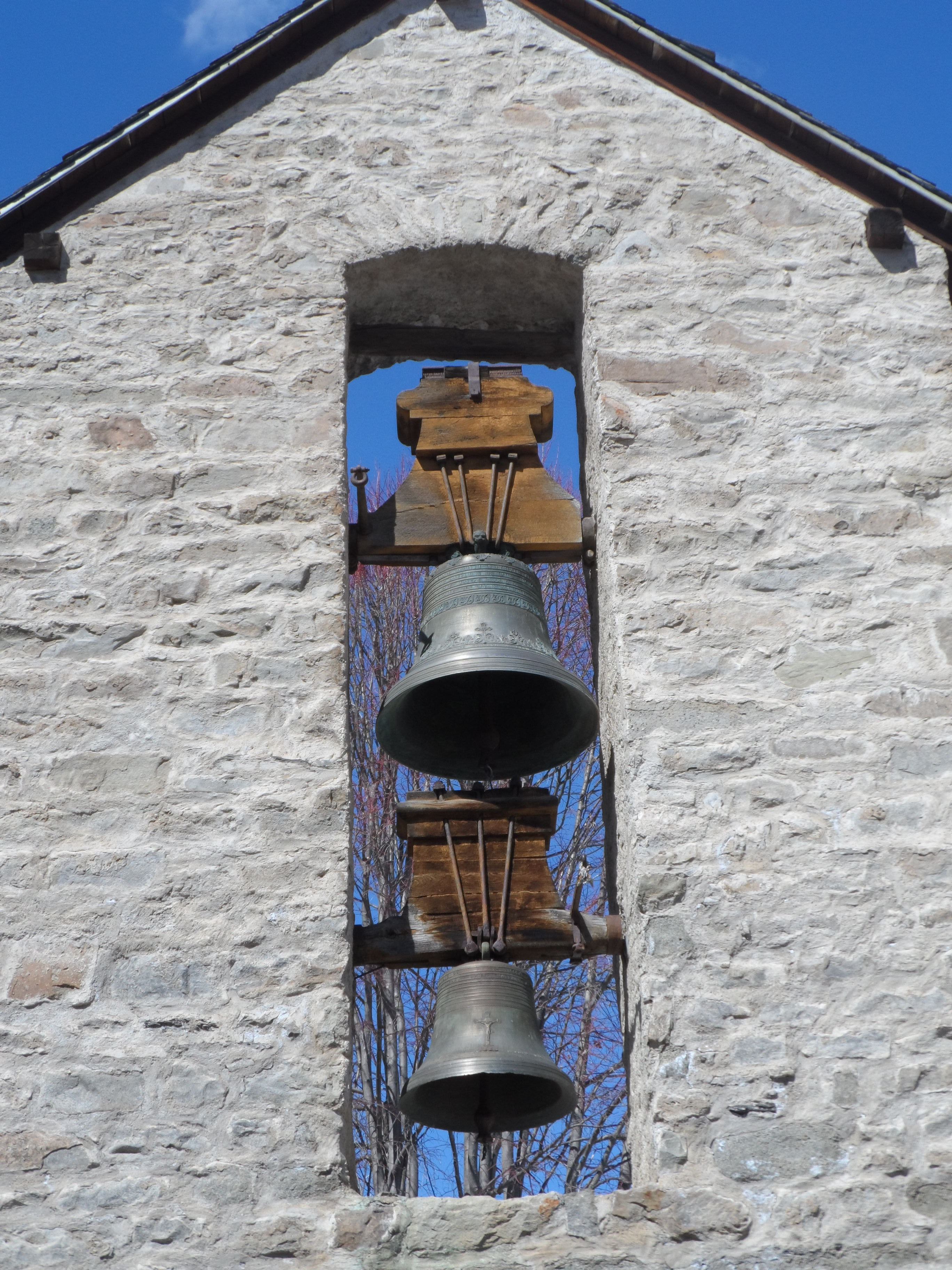 Clocher-mur (« panelle ») de l'ancienne église de Saint-Nicolas